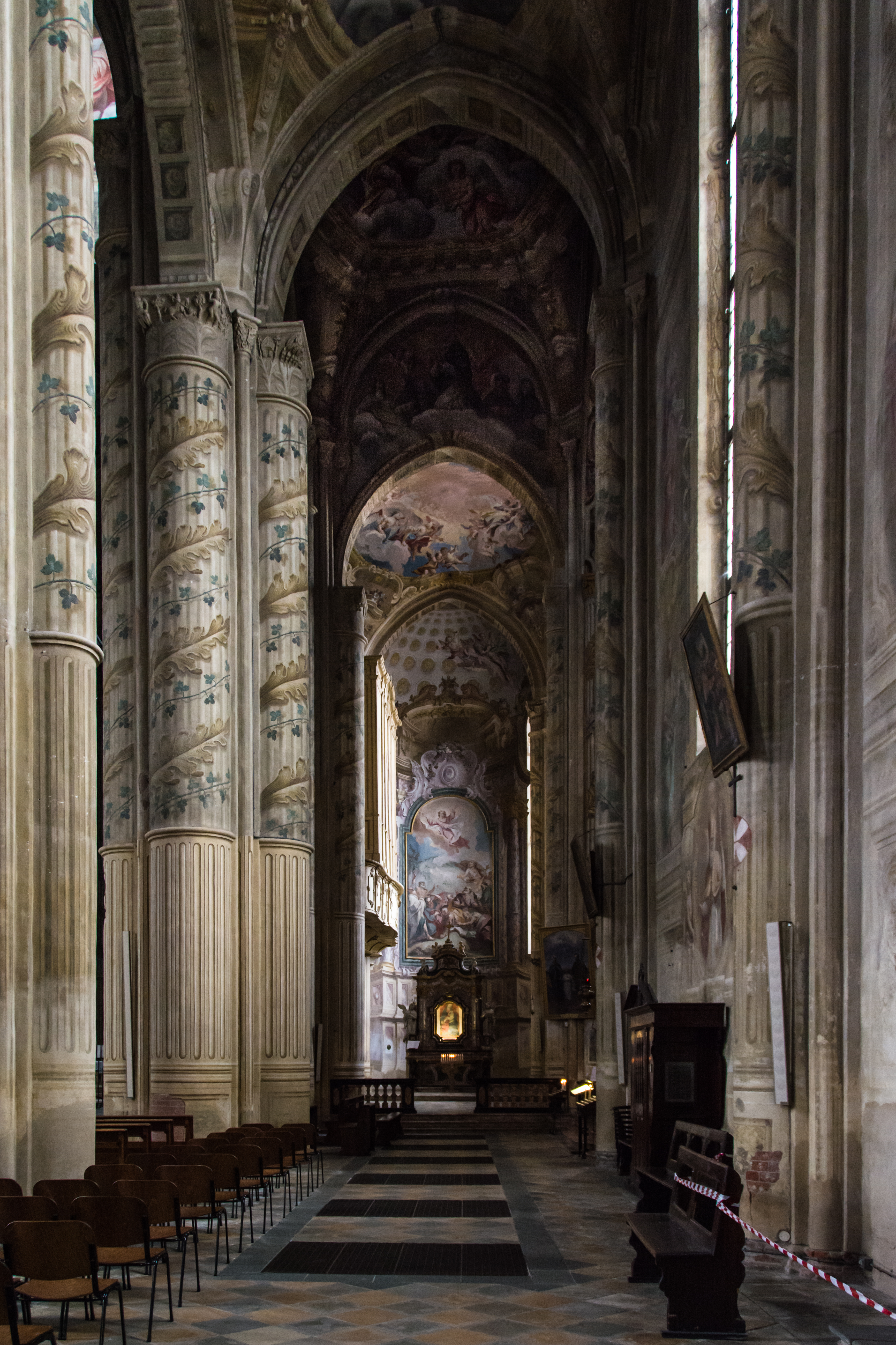 Complesso Episcopale della Cattedrale This is a photo of a monument which is part of cultural heritage of Italy.